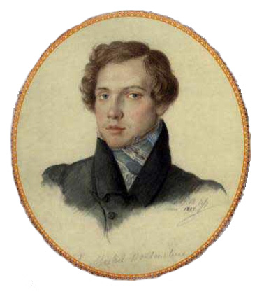 Бутурлин Михаил Дмитриевич (1807-1876), сын Д.П. и А.А. Бутурлиных, впоследствии чиновник при разных губернаторах, с А.С. Пушкиным общался в детстве в Москве, а затем в Одессе в 1824 году.